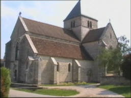 L'église de Rouvres-en-Plaine, en Côte-d'Or.